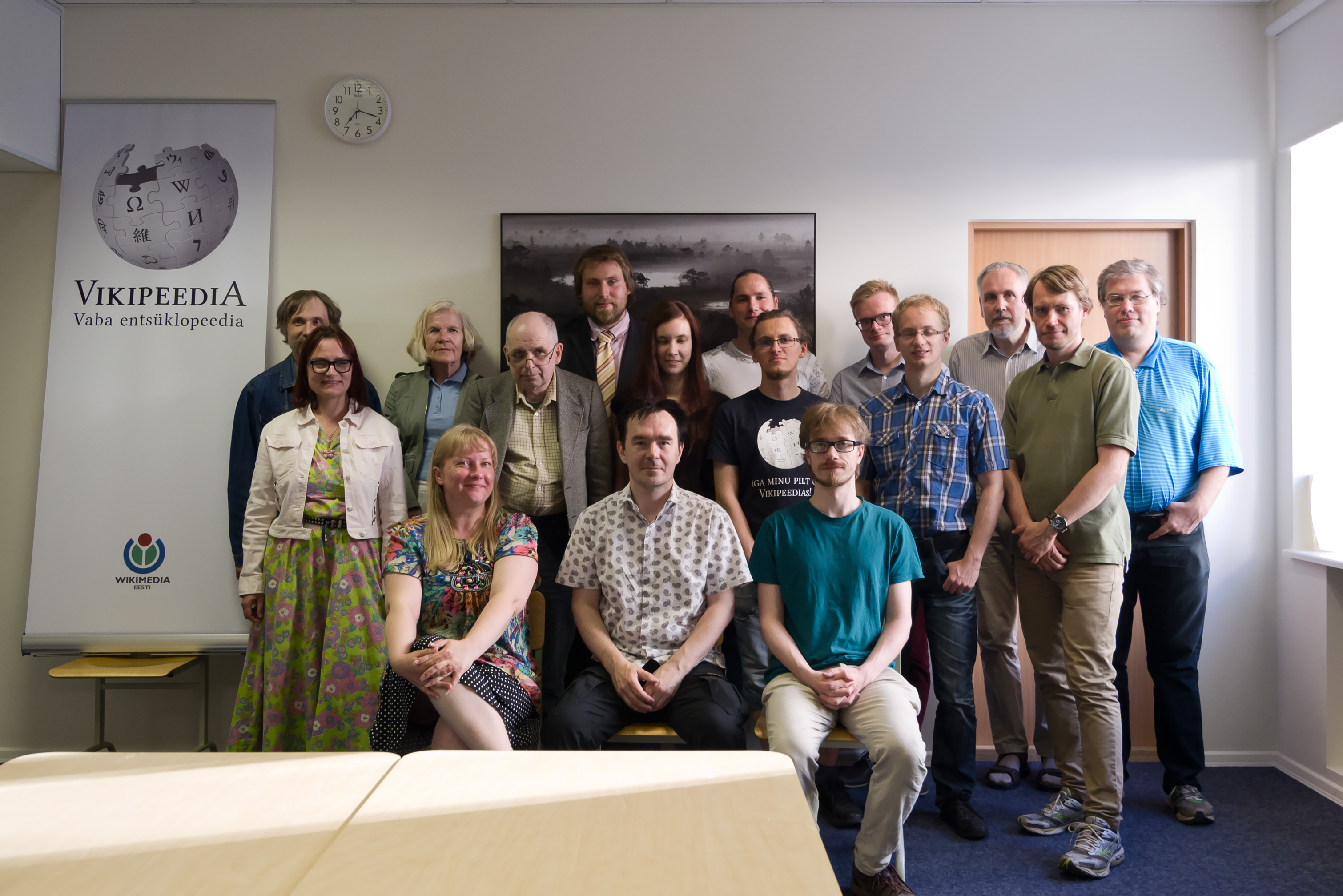 Wikimedia Eesti MTÜ üldkoosolekust osavõtjad. Koosolek toimus 29. juunil 2015 Eesti Keele Instituudis.